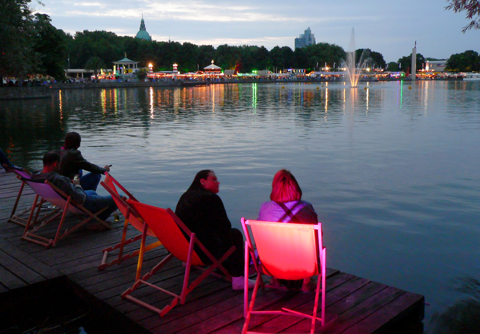 Maschseefest